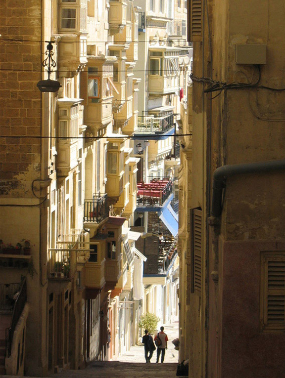 La Valletta, Malta - 2004